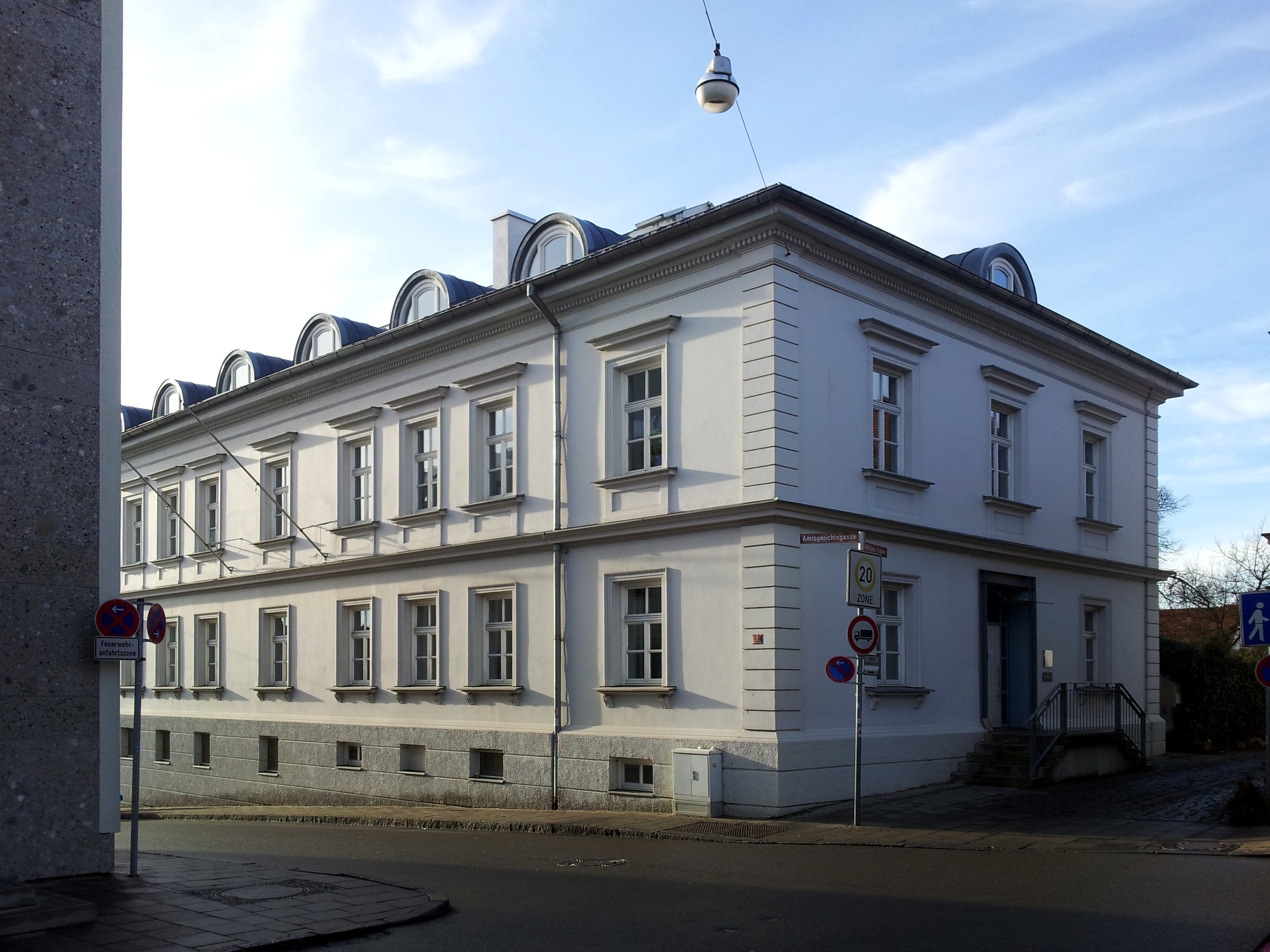 Ehemaliges Amtsgericht Freising, jetzt städtisches Ämtergebäude, stattlicher zweigeschossiger Walmdachbau mit reicher spätklassizistischer Gliederung, um 1880/90